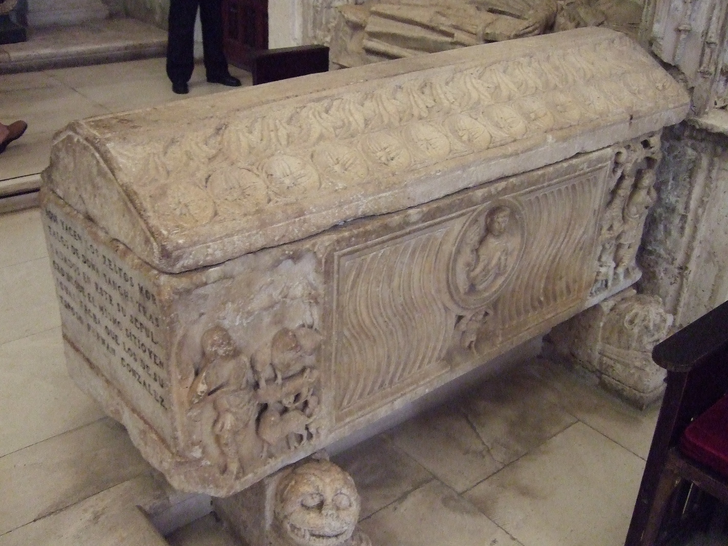 Colegiata de San Cosme y San Damián, Covarrubias - Tumba de doña Sancha, sarcófago hispano-romano del siglo IV